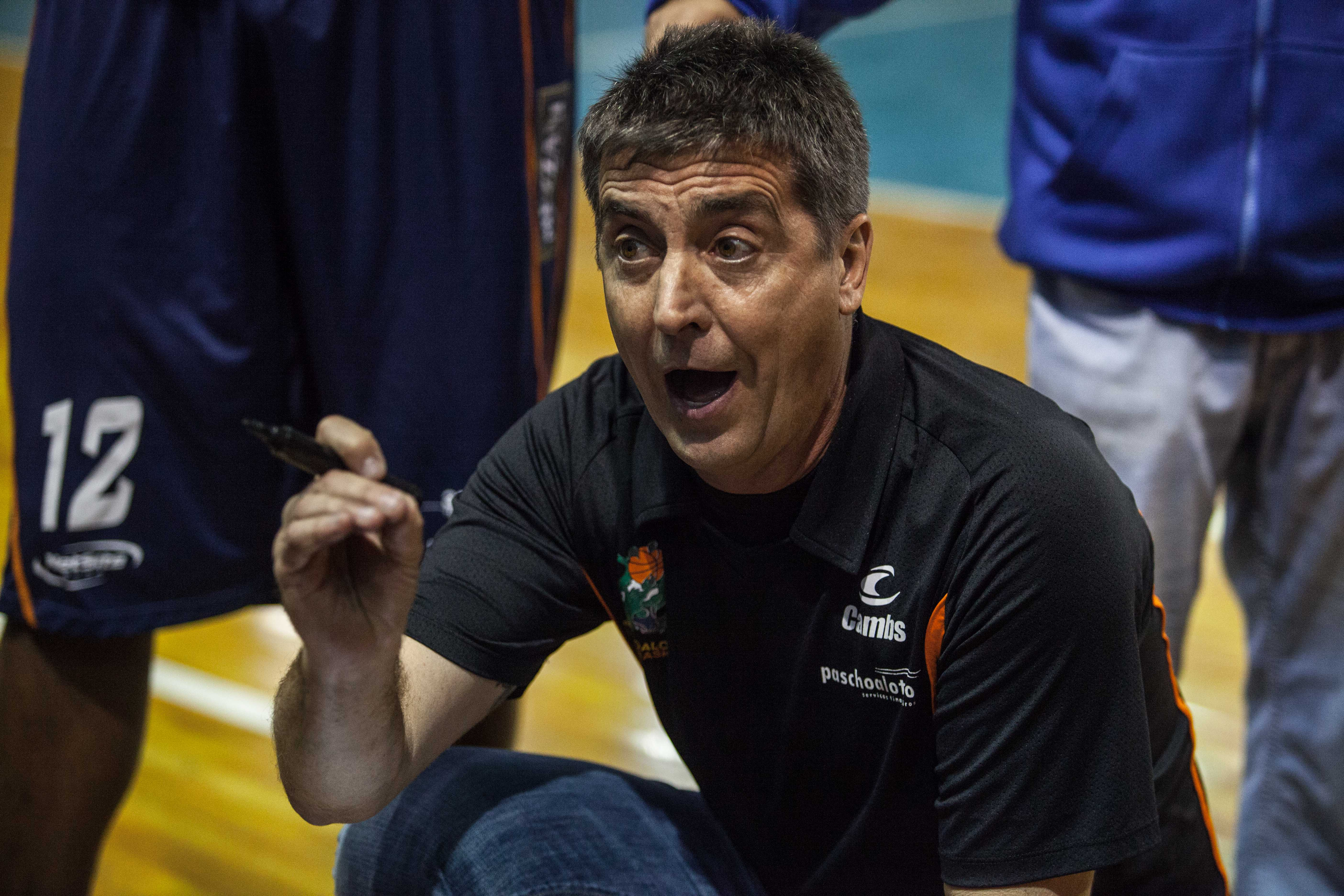 Campeonato Paulista de Basquete, 17ª rodada, Pinheiros 95 x 91 Bauru. crédito: de lima/dubem. Na foto, o técnico Guerrinha.